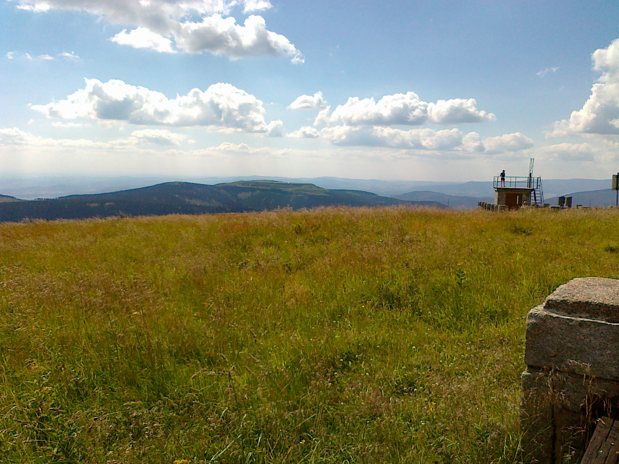 Widok ze szczytu góry Pradziad na platformę widokową i na góry Vřesník, Dlouhé stráně, Kamenec (1)